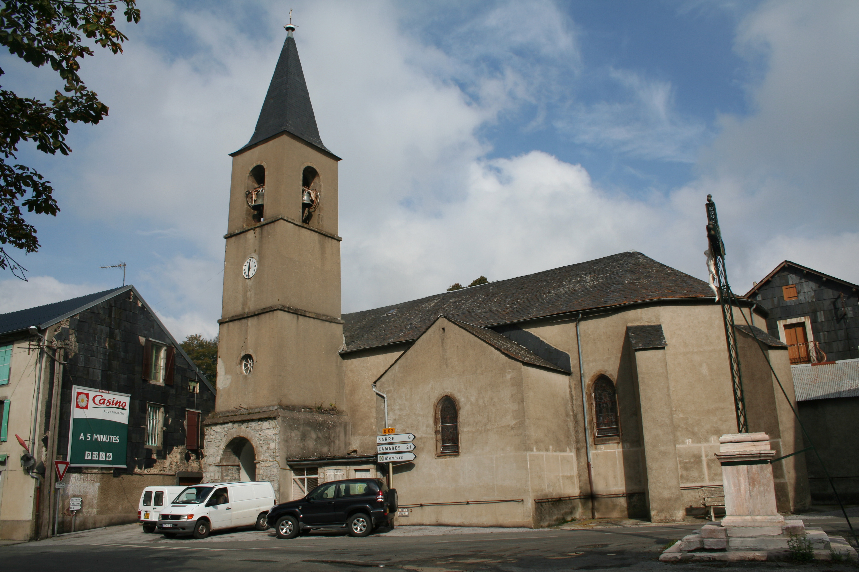 Moulin-Mage (Tarn) - Église Notre-Dame (1836), photo prise en 2007.